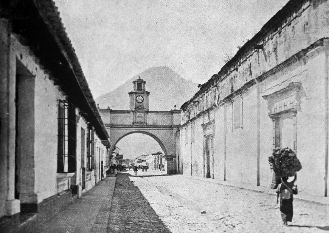 Arco de Santa Catalina en 1897. Obsérvese que ya tenía el reloj instalado.